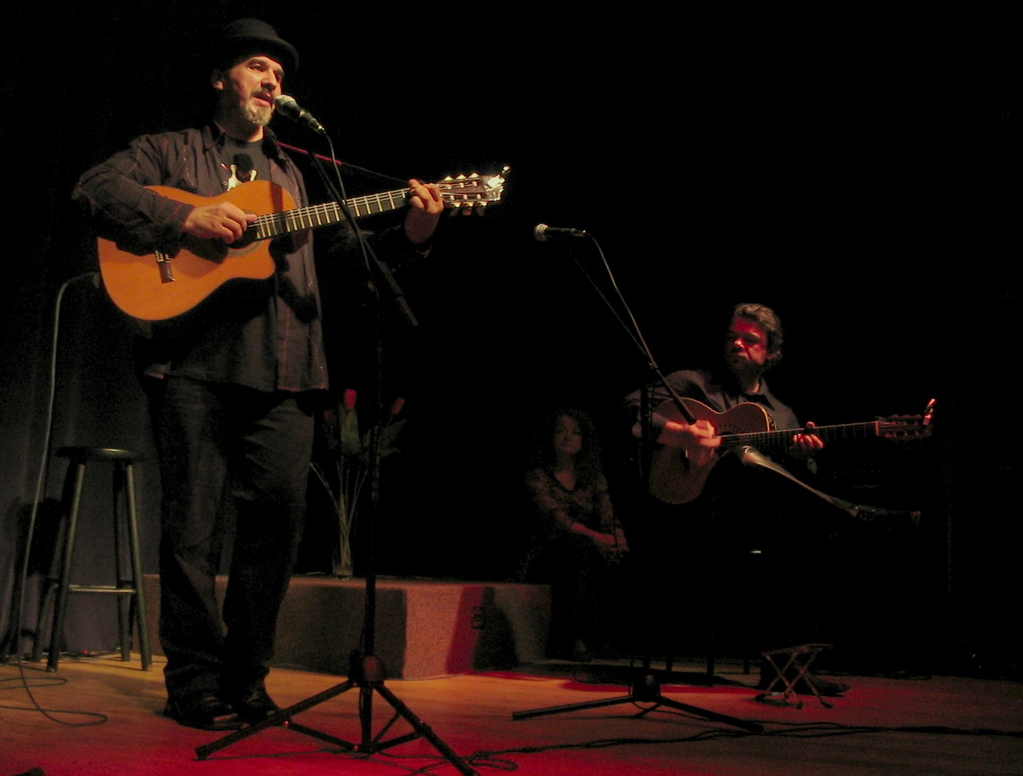 Stefan Brzozowski wraz z Andrzejem Czamarą podczas koncertu grupy Czerwony Tulipan. Zielona Góra, maj 2006